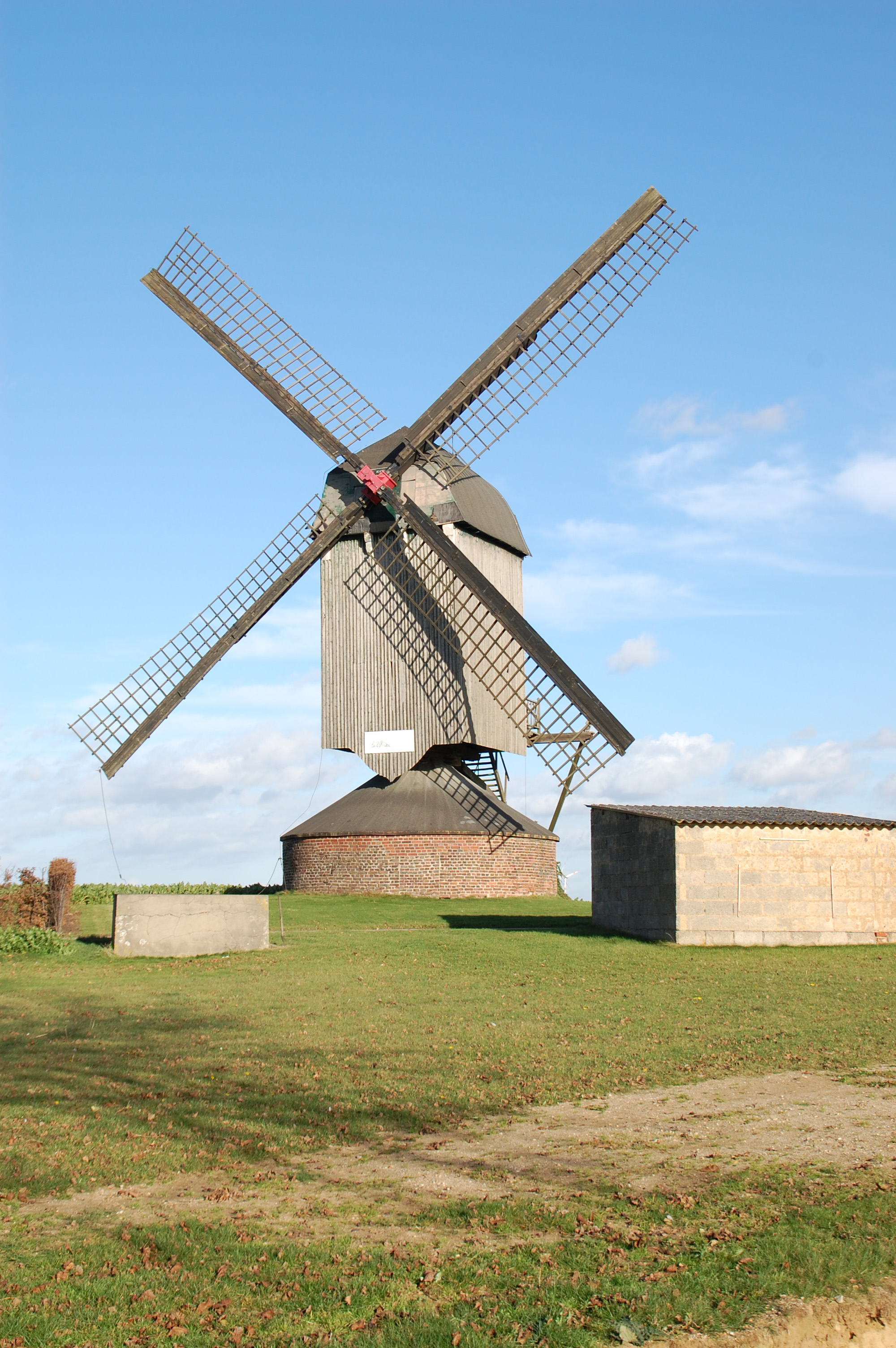 Düppelsmühle Titz; früher Efferener Windmühle